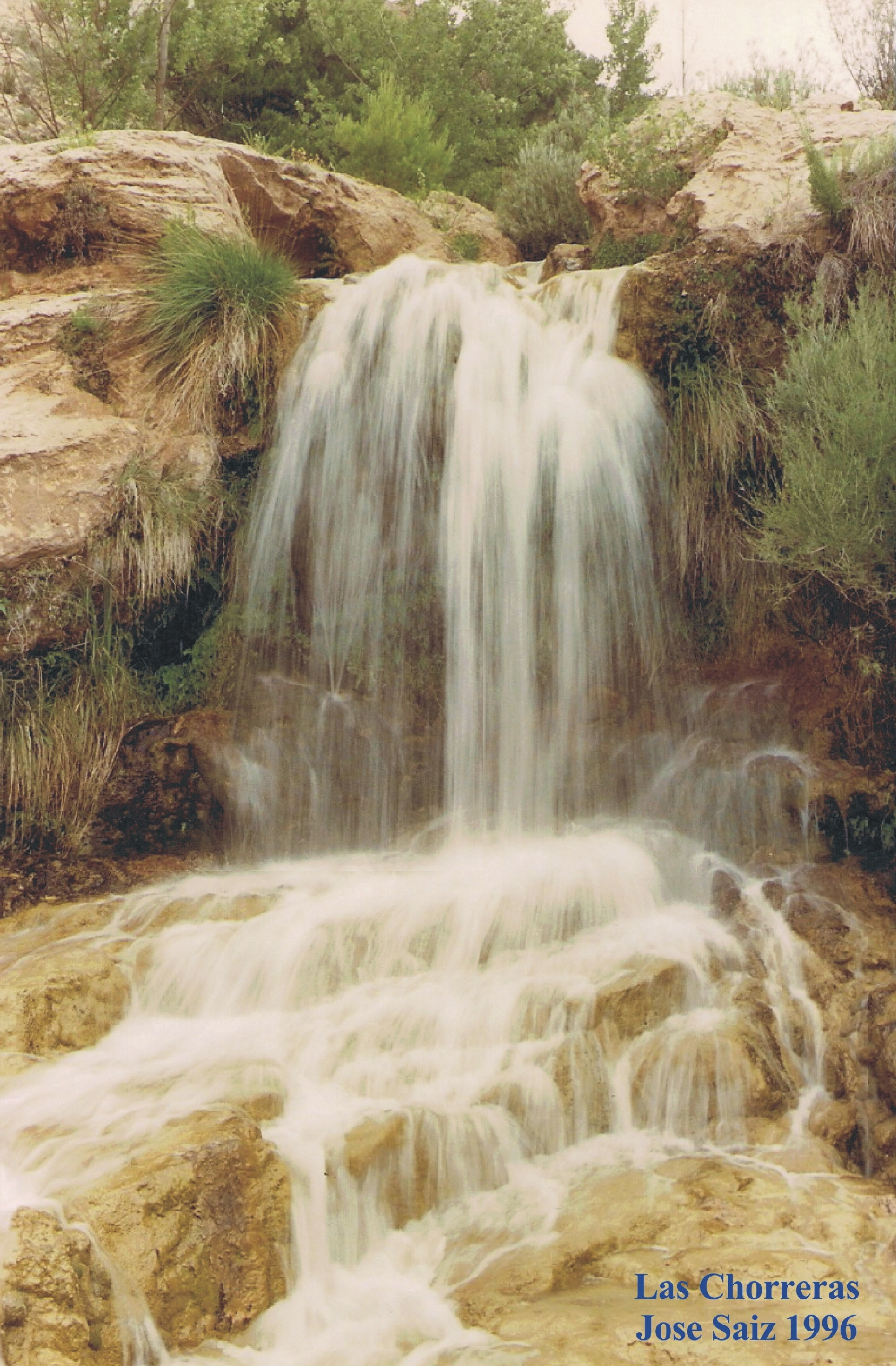 Cascada principal de Las Chorreras (Enguídanos - Cuenca)